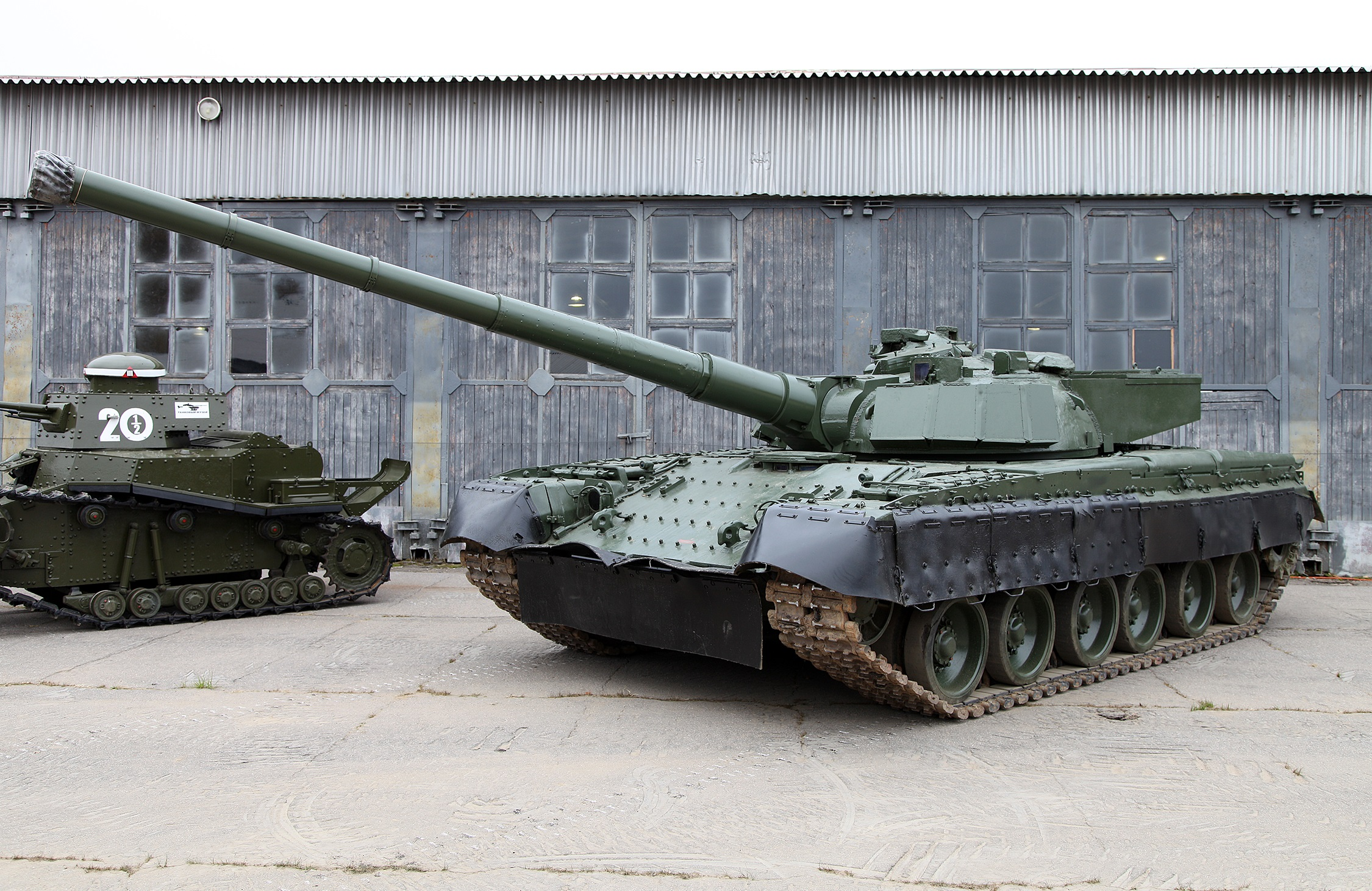 Экспериментальный танк "Объект 292" во время "Дня отважных людей" в ЦМ БТВТ.